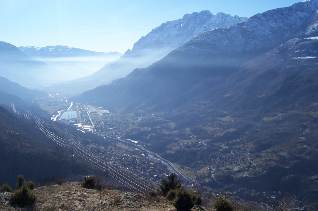 Sellero, territorio comunale , Val Camonica, Italia